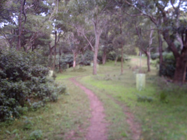 Ken Ausburn Track